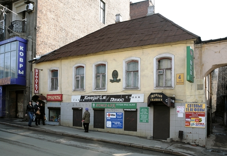 Будинок Є.Урюпіна